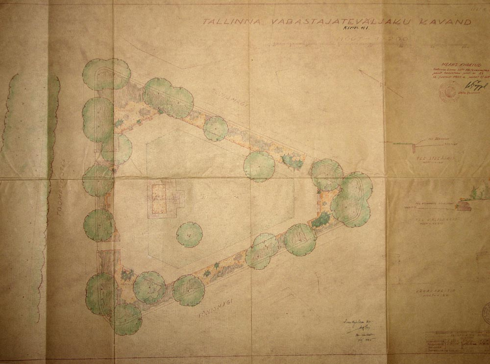 Map of mass grave on Tõnismägi hill in Tallinn